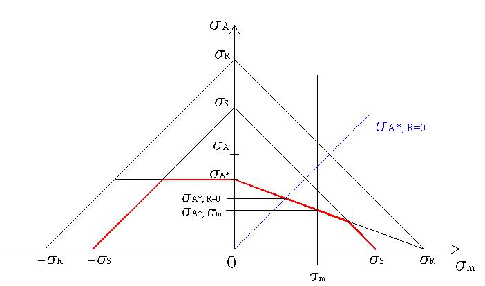 diagramma di haigh